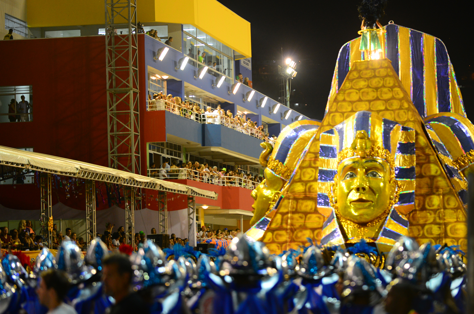 Desfile da SCRS Embaixada Copa Lord em 2014.